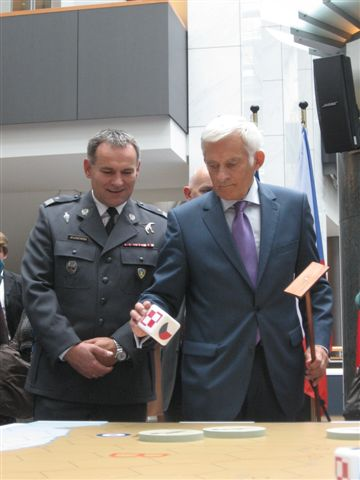 W Parlamencie Europejskim w Brukseli odbyła się europejska premiera ngry edukacyjnej IPN zatytułowanej „303”. W siedemdziesiątą rocznicę Bitwy o Anglię swoje umiejętności w grze sprawdzał między innymi przewodniczący Parlamentu Europejskiego Jerzy Buzek.